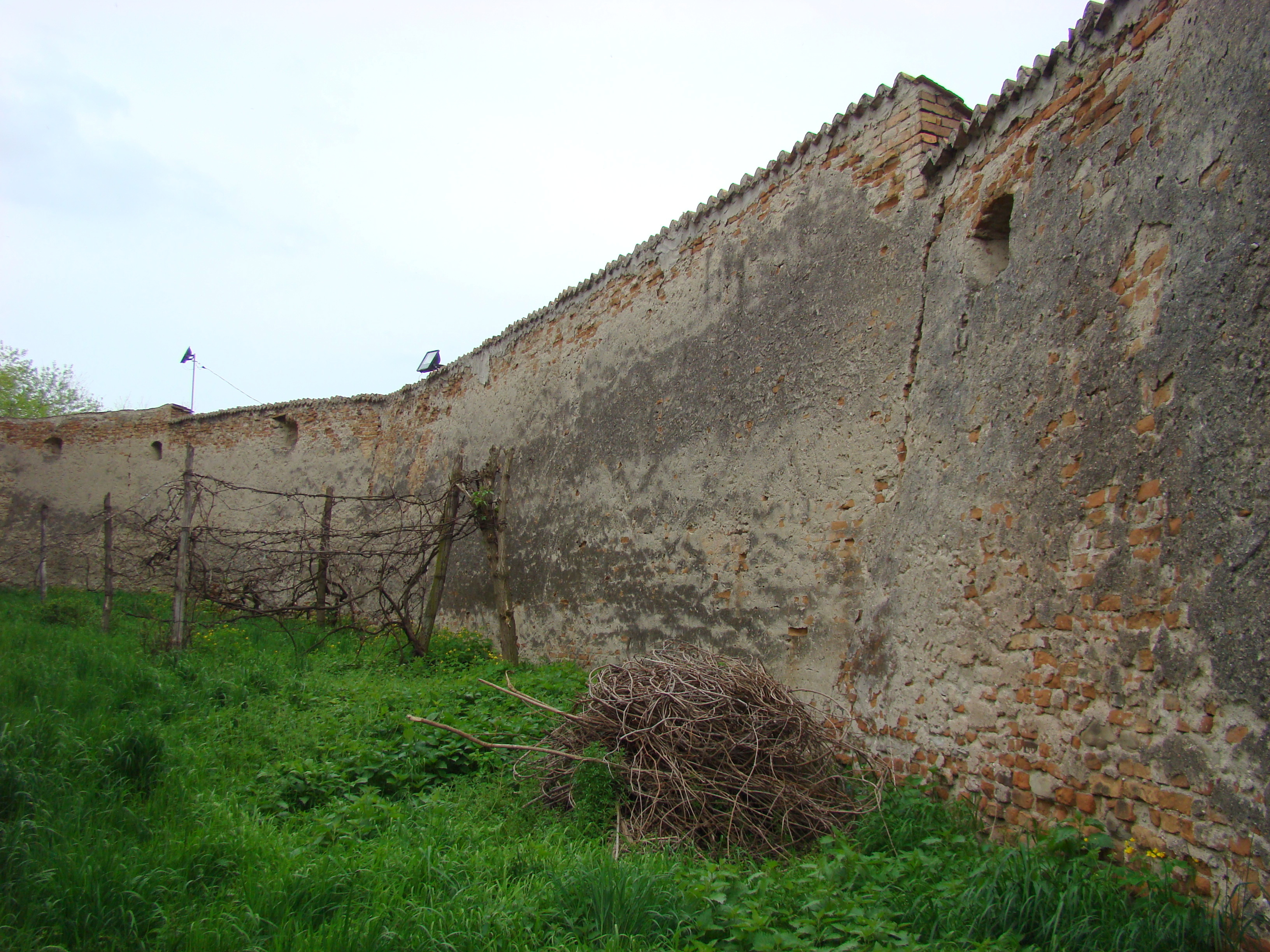 Ansamblul bisericii evanghelice fortificate, sat Agârbiciu; comuna Axente Sever, județul Sibiu 02